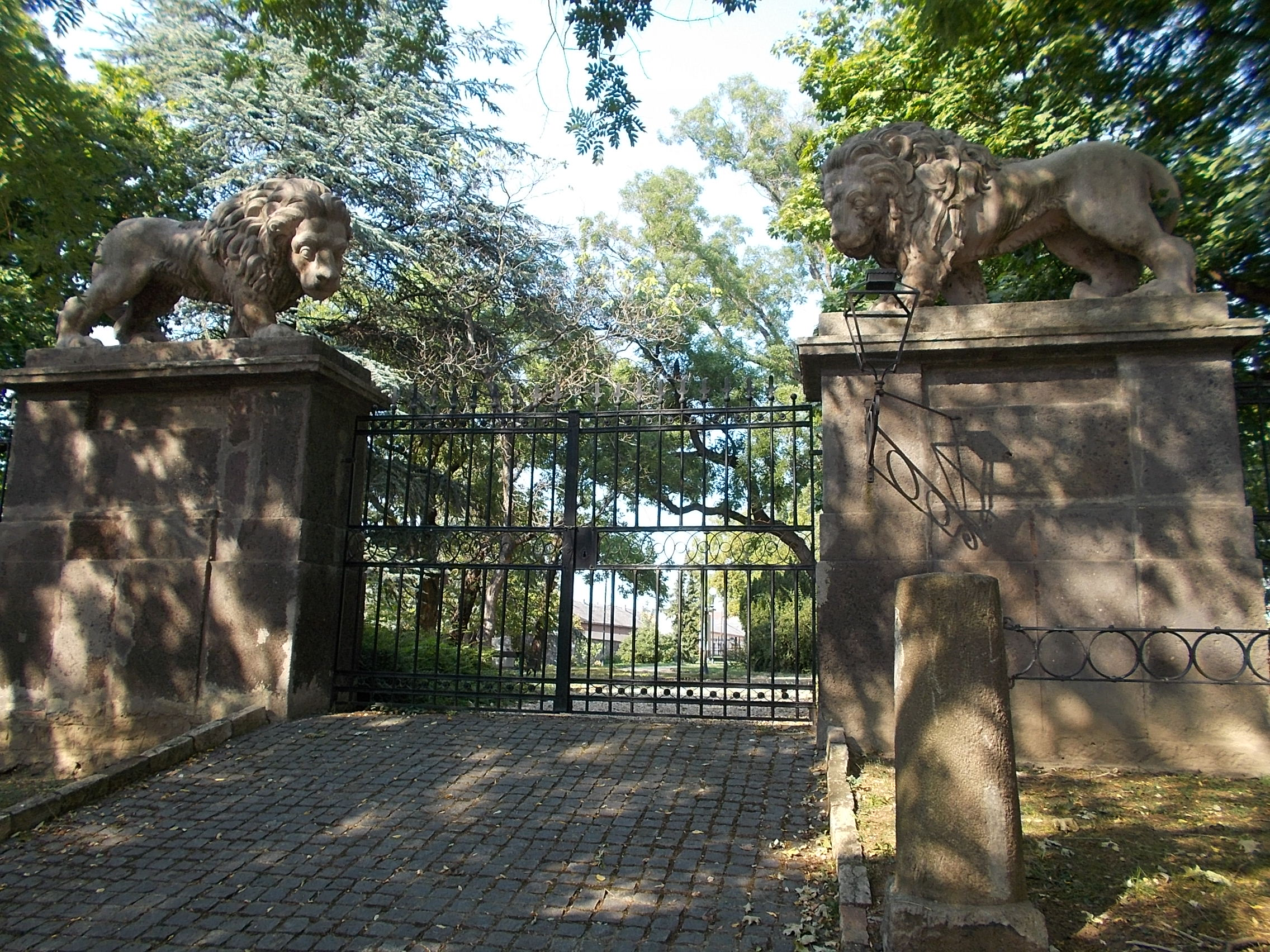 Stone lions by Ferenc Uhrl at Orczy Mansion. Monument ID 5688. Now here is the Mátra Museum. The museum consists of three units, namely the Orczy Mansion, the new pavilion of Natural History and the two -hectare park which was declared as a nature reserve. - The castle originally built in Baroque style that accommodates the Mátra Museum was built by Lőrinc Orczy between 1769 and 1770. It was rebuilt in Classicist style in 1826. Open: Tue-Sun: 10-17, Closed on Mon. (2015) - Kossuth st. 40, Gyöngyös, Hungary